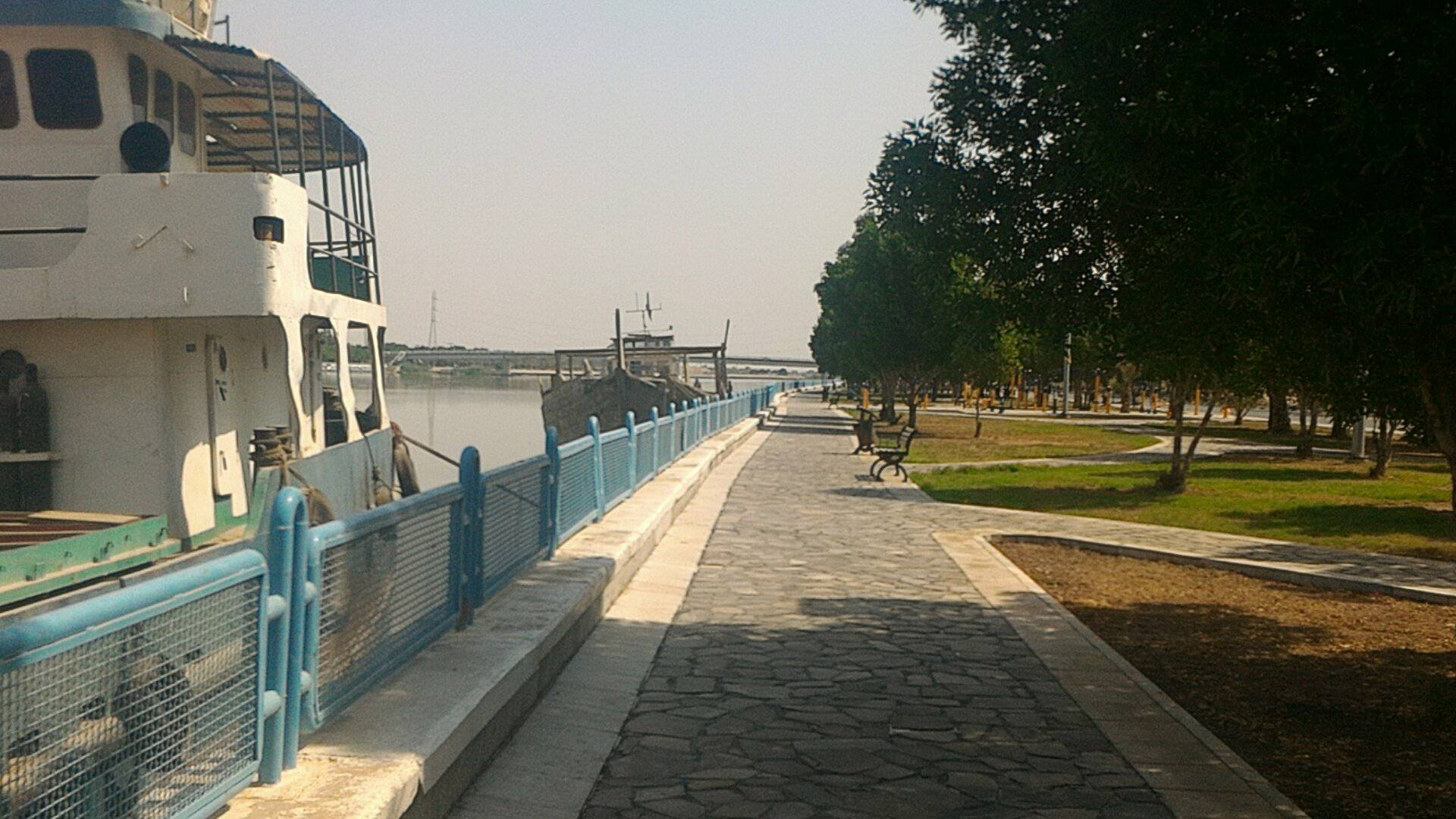 نمایی از خرمشهر - مهر ۱۳۹۶